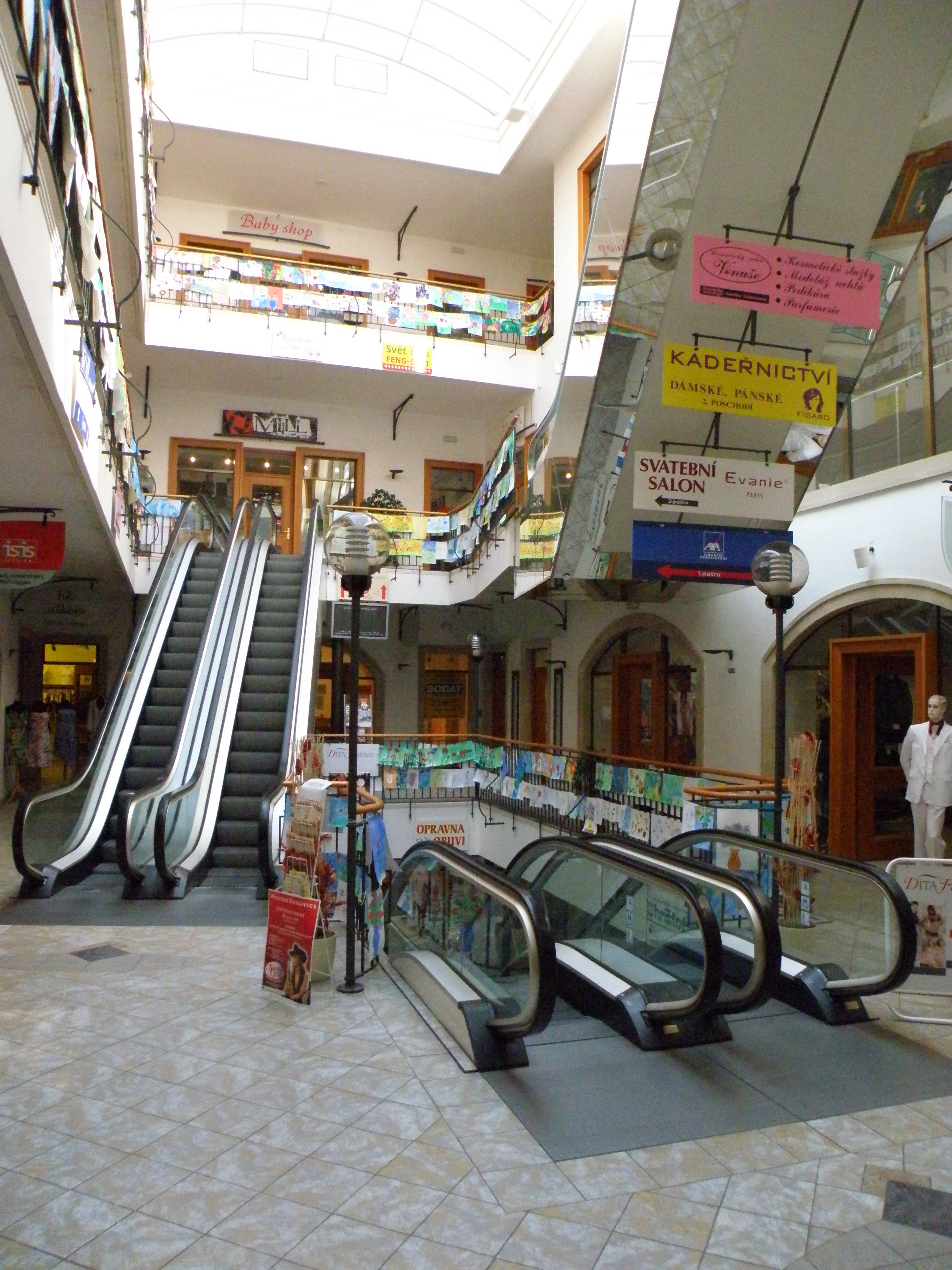 Interiér Obchodní galerie Orlí.